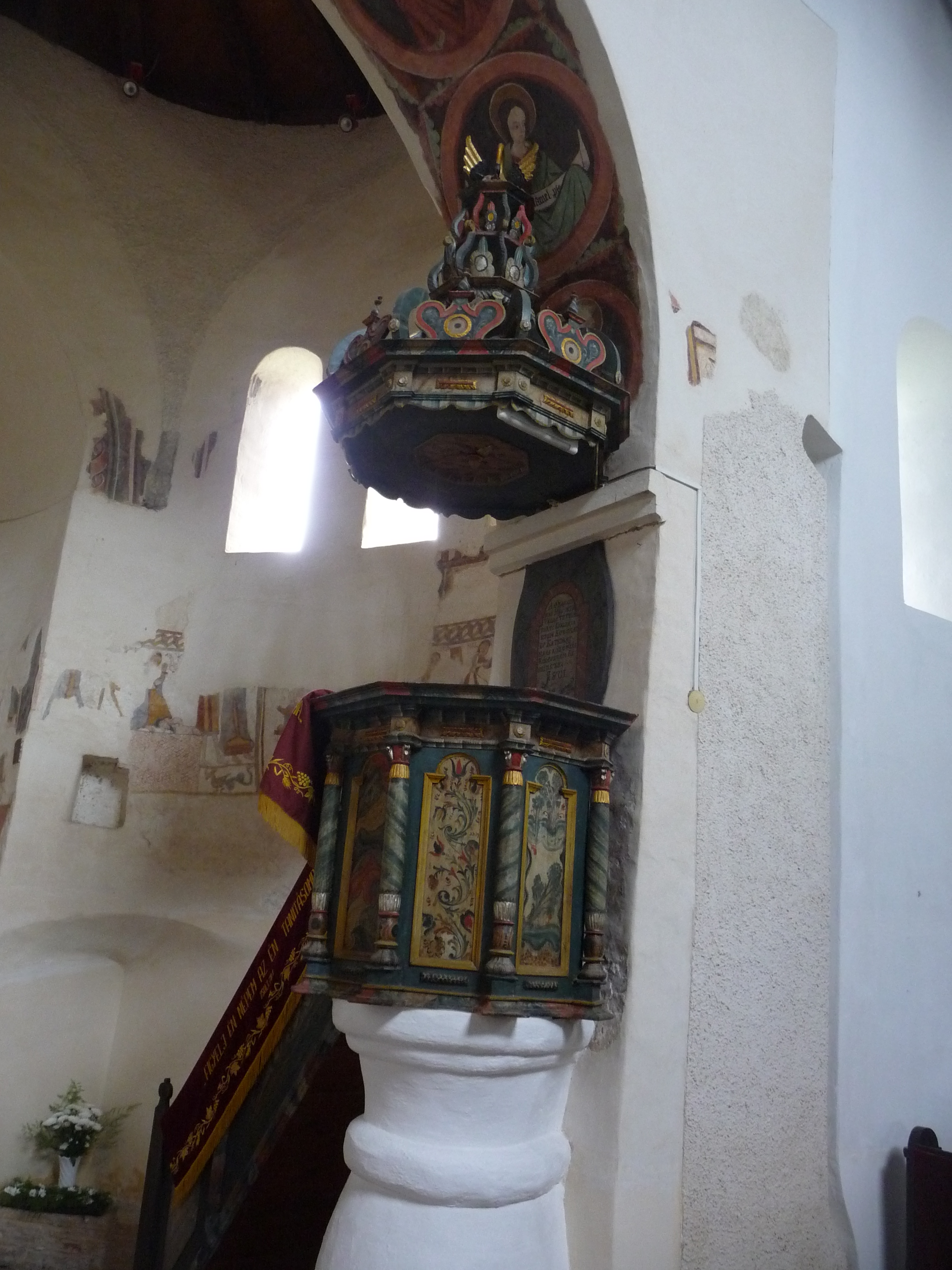 A szalonnai református templom szószéke